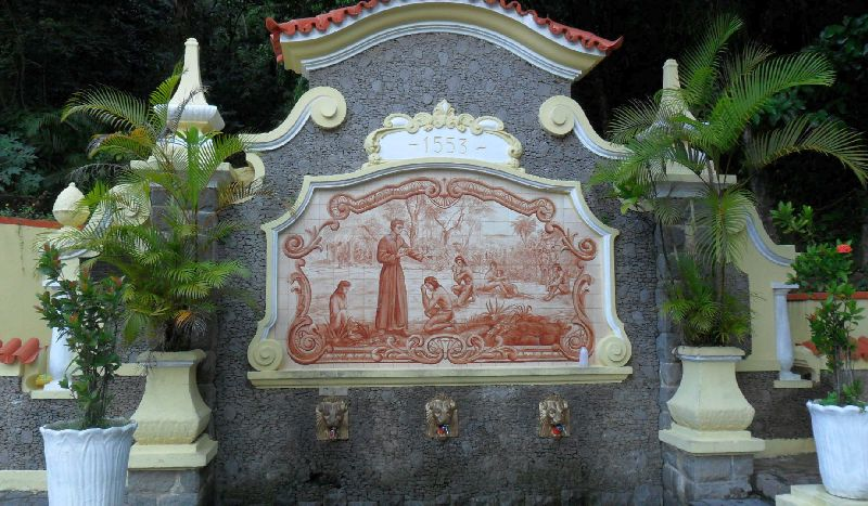 Biquinha em São Vicente.